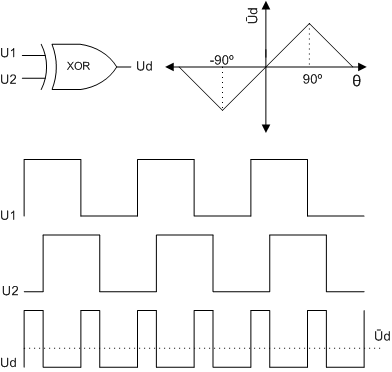 diagrama y gráficas del detector de fase de un PLL de tipo XOR